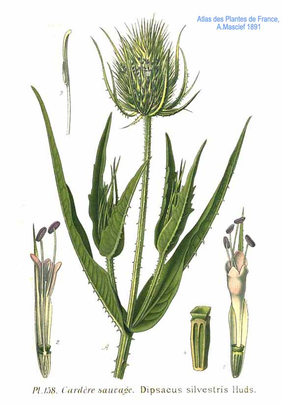 Dipsacus fullonum = Dipsacus silvestris Huds.